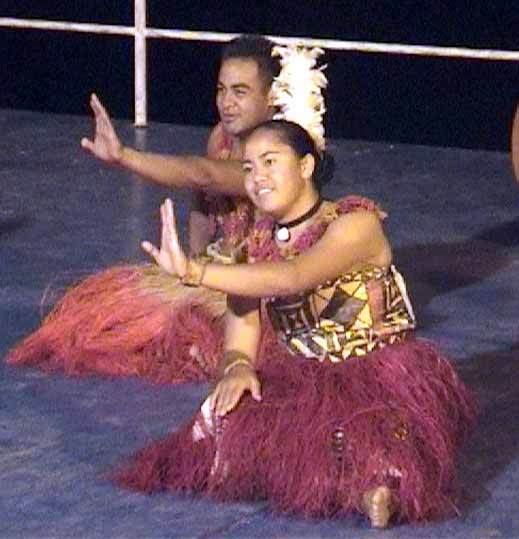 A Tongan ʻotuhaka dance